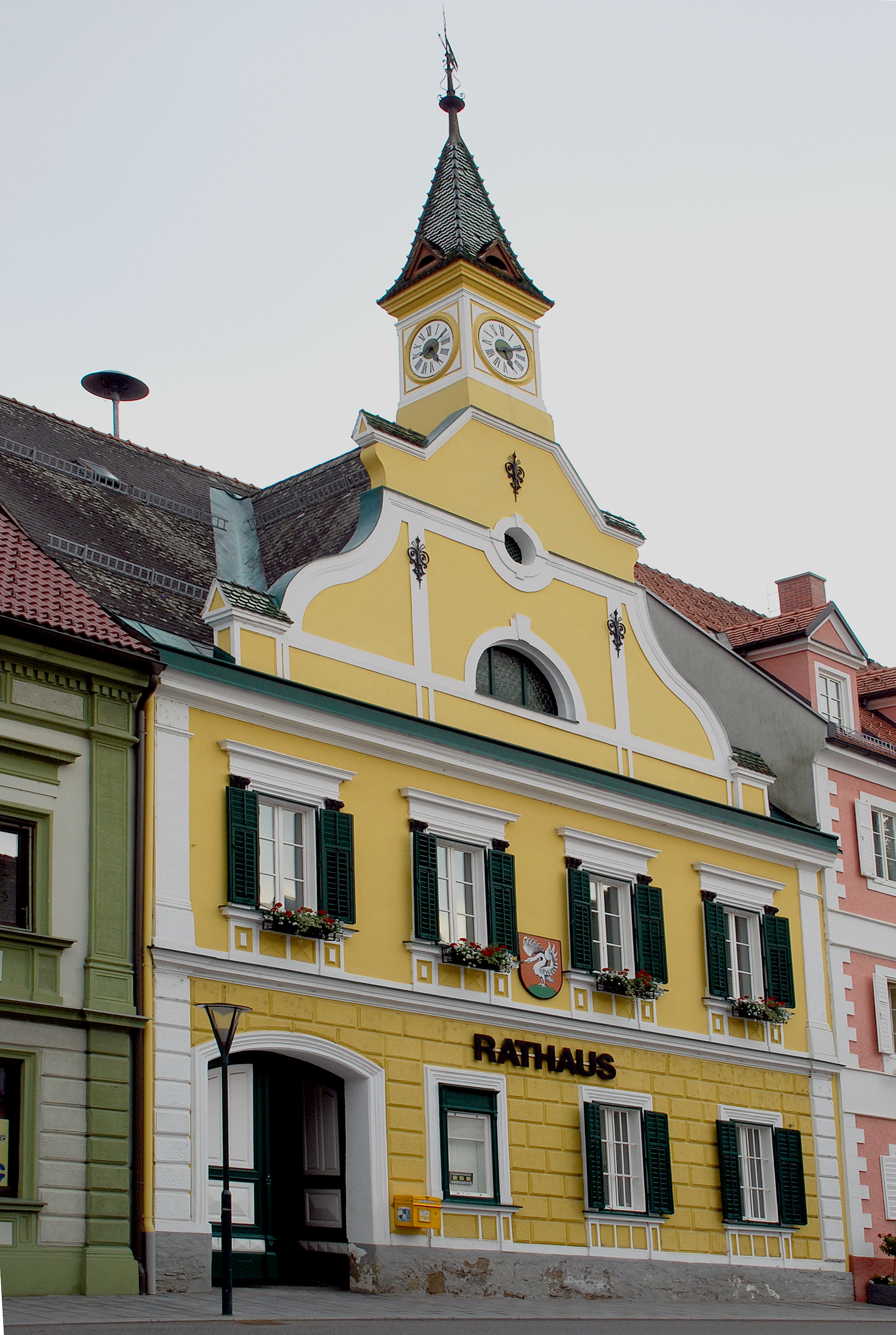 Schwanberg, Steiermark, Österreich: Rathaus; mit Uhrtürmchen und Sirene